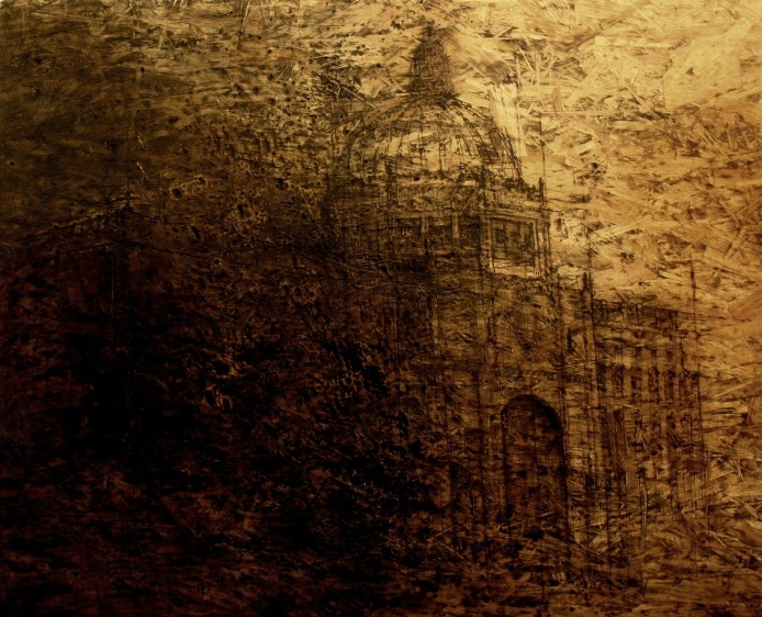 הארמון 2008 מופיע בערך שי עבאדי